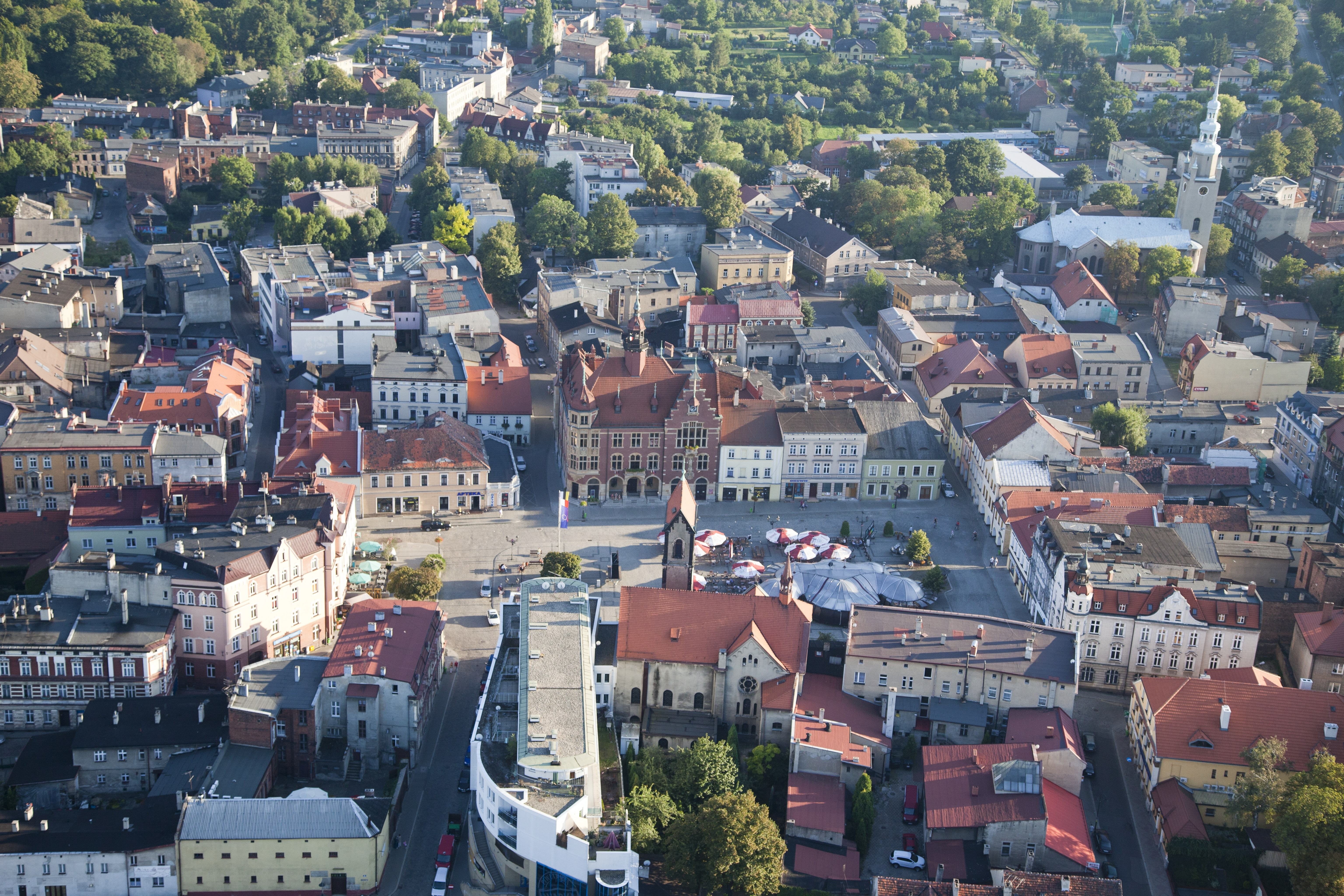 Śródmieście Tarnowskich Gór z rynkiem widziane z lotu ptaka